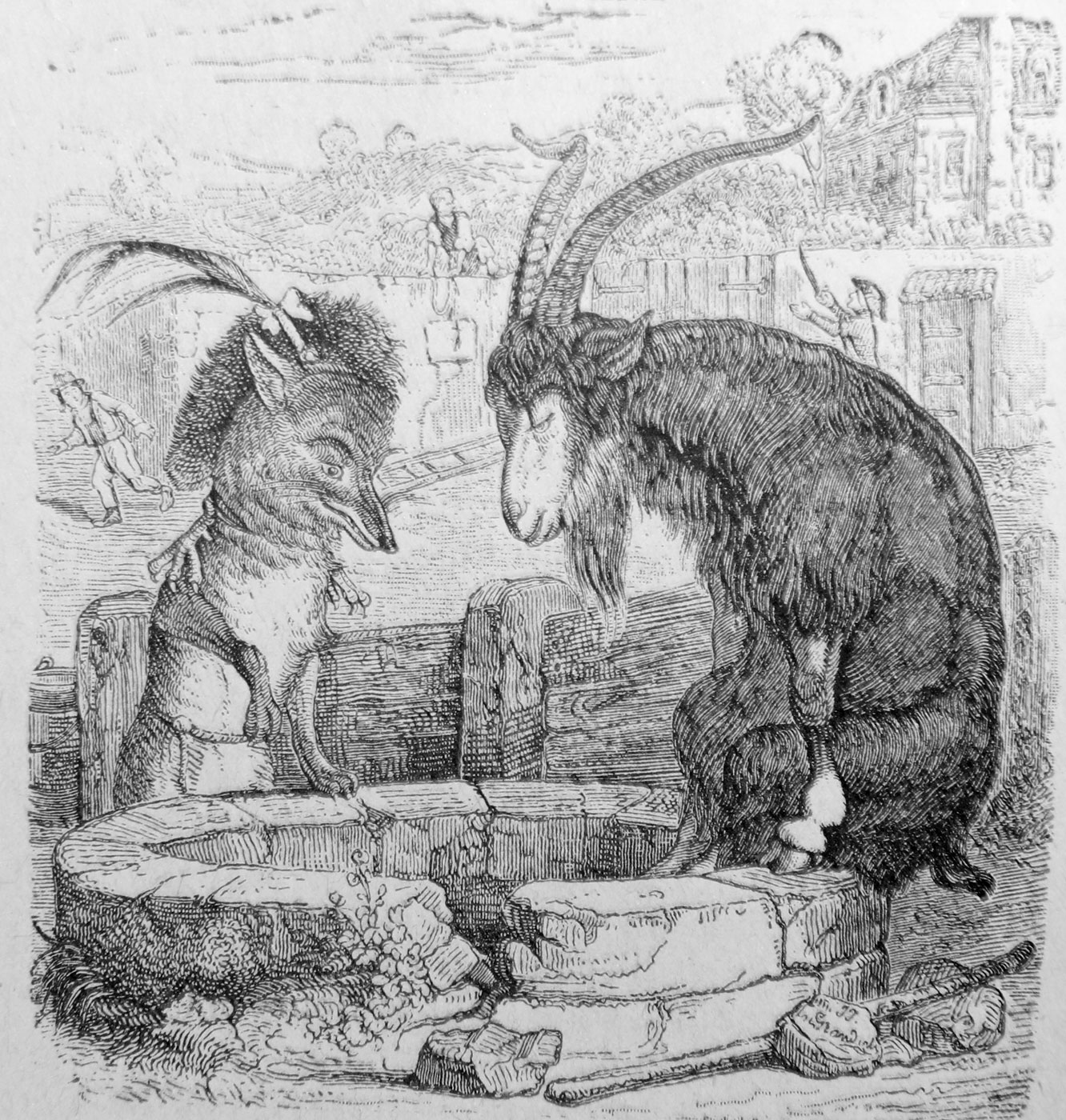 J.J. Grandville. Illustrations des Fables de La Fontaine. 1838-1840.